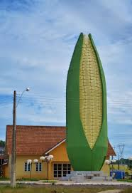 eeeeeeee